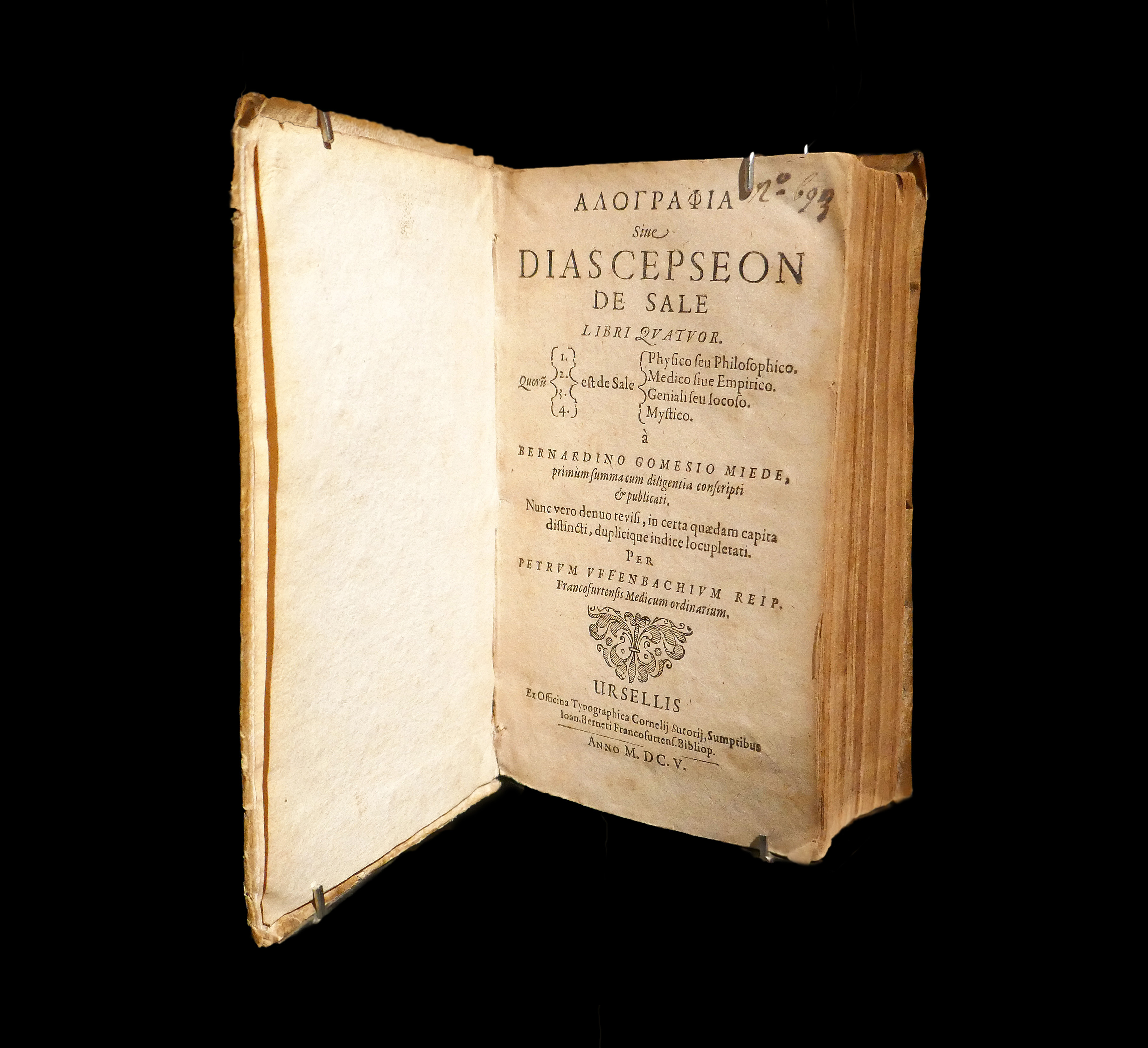 Bernardino Gomesio Miede, Alographia sive Diascepseon de save, imprimé à Oberursel (Allemagne), 1605. Publié pour la première fois en 1572 à Valence (Espagne) sous le titre Commentariorum de sale libri quatuor. Traite des usages du sel en cuisine, de ses propriétés médicales et de ses qualités mystiques et alchimiques. Musée des marais salants à Batz-sur-Mer (Loire-Atlantique).